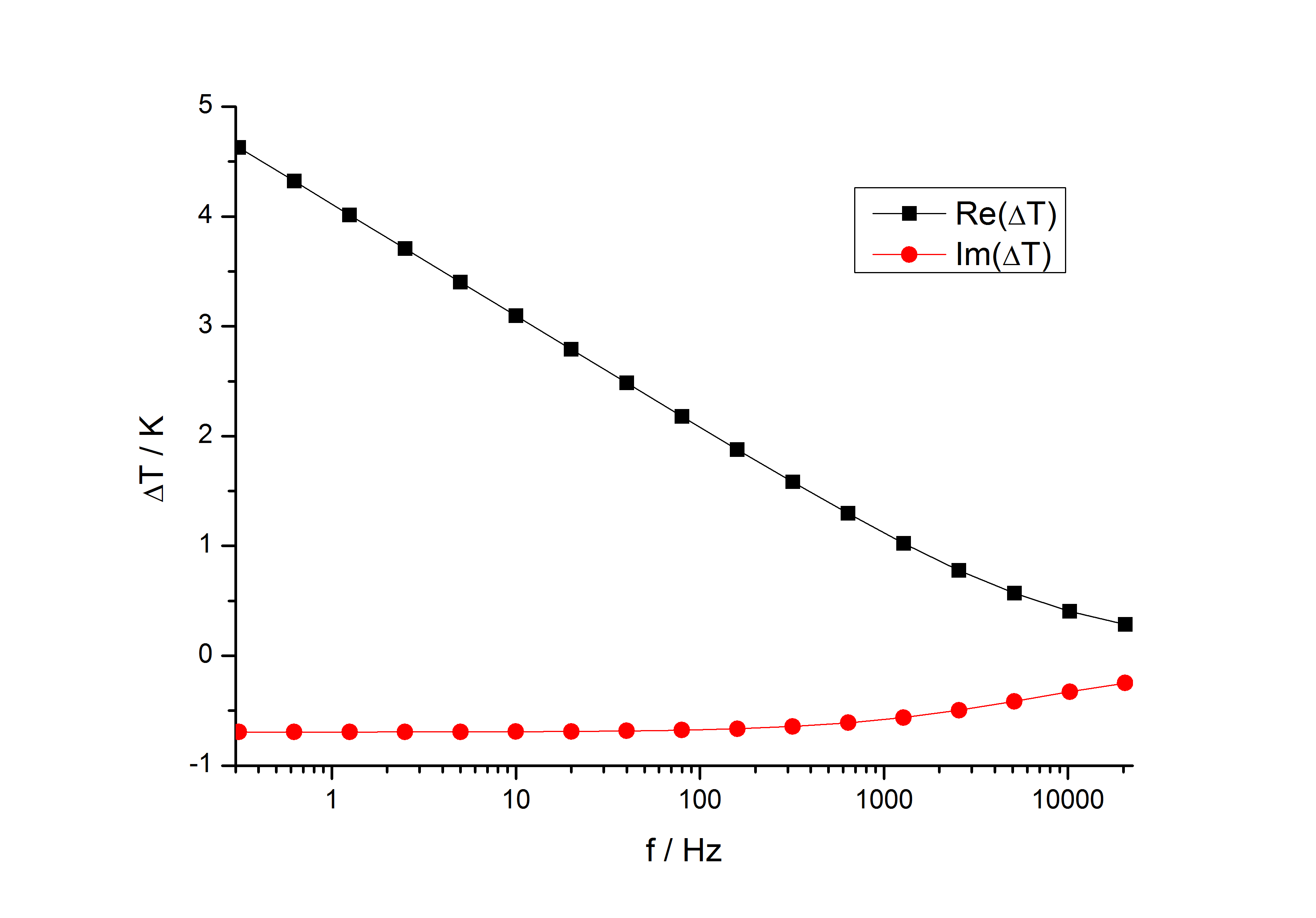 Beispiel für eine ΔT-Kurve für ein Glassubstrat während einer 3-Omega-Messung. Die Werte wurden numerisch bestimmt.